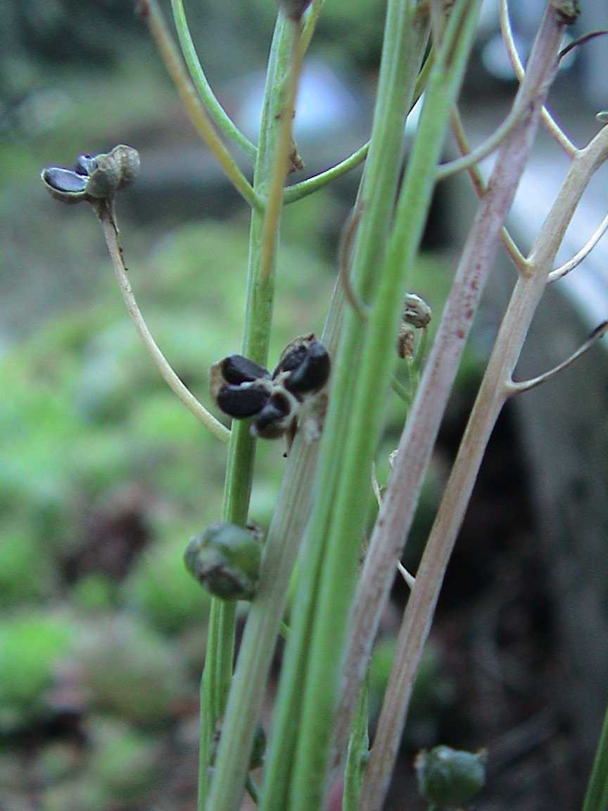 Scilla autumnalis (capsules)